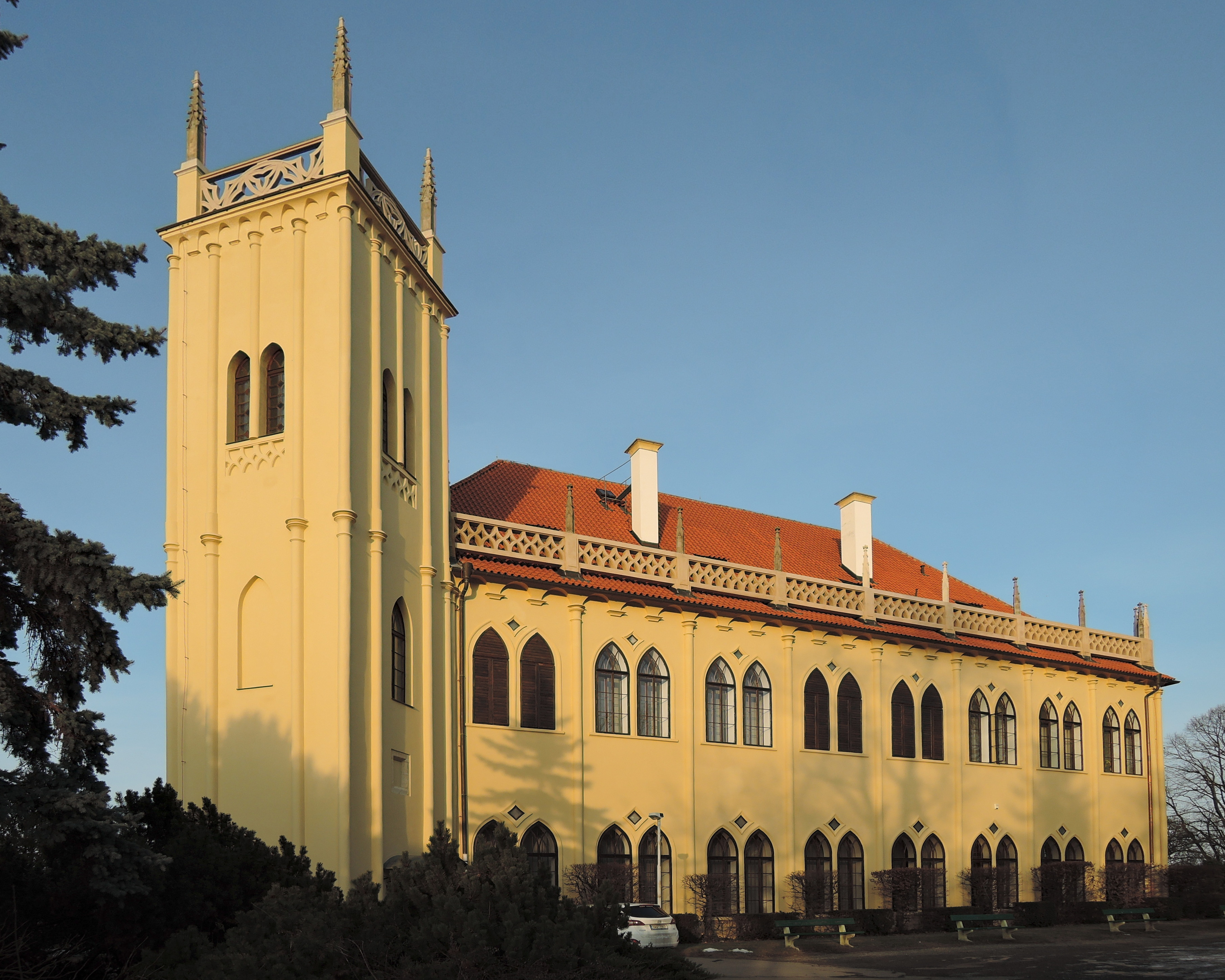 Praha, Bubeneč, Místodržitelský letohrádek